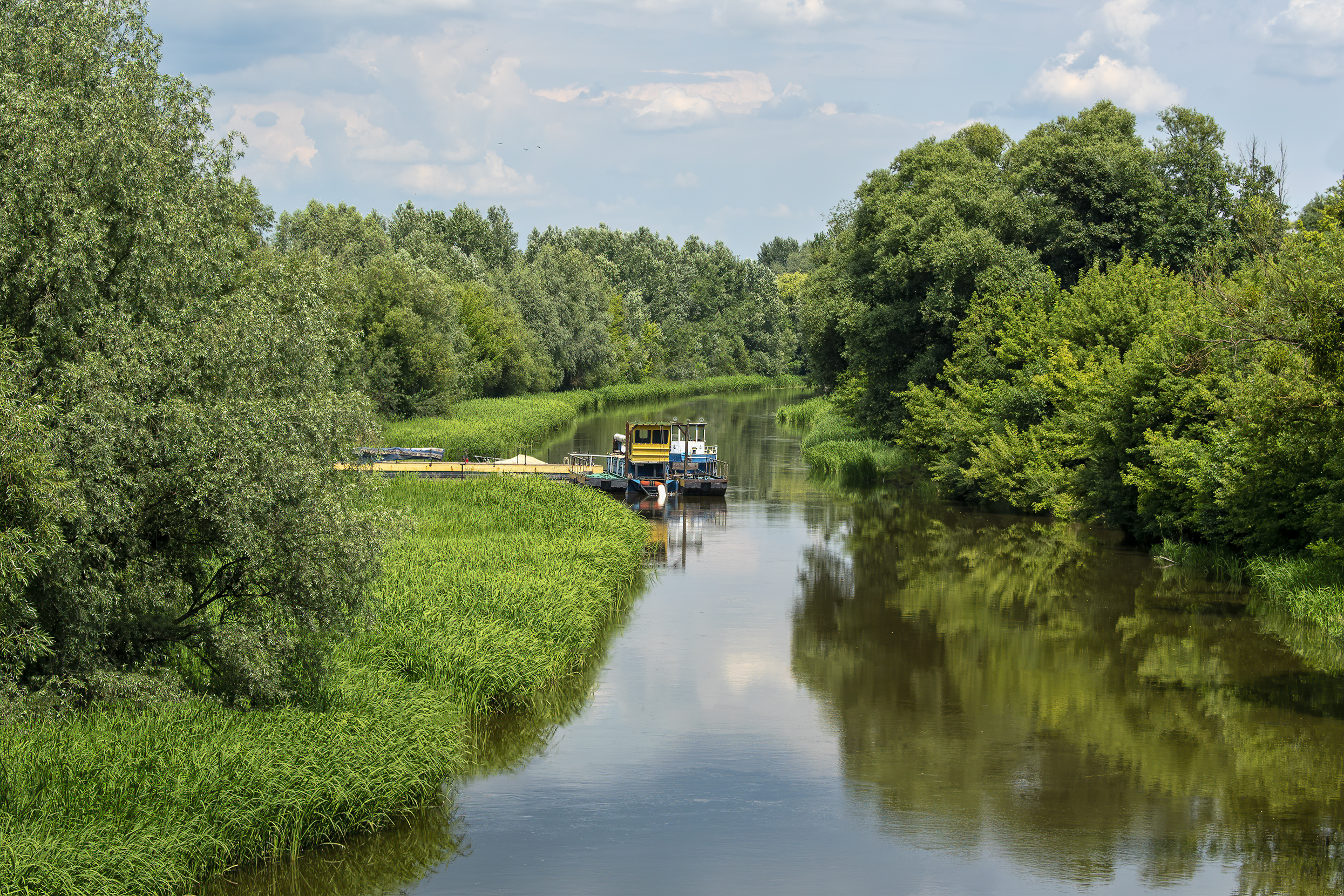 Кораблі на річці Стир у Луцьку